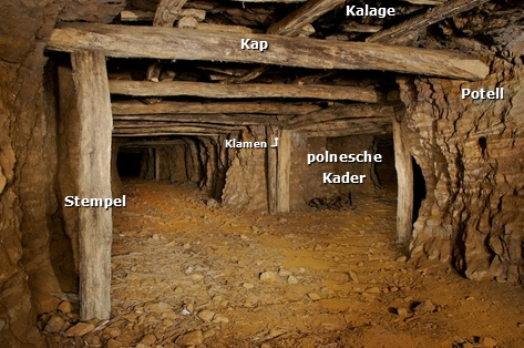 Holzausbau an der Minière Holleschbierg.